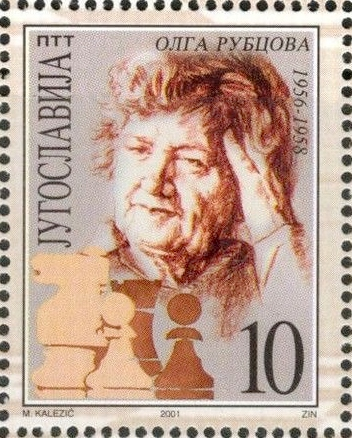 Olga Rubtsova